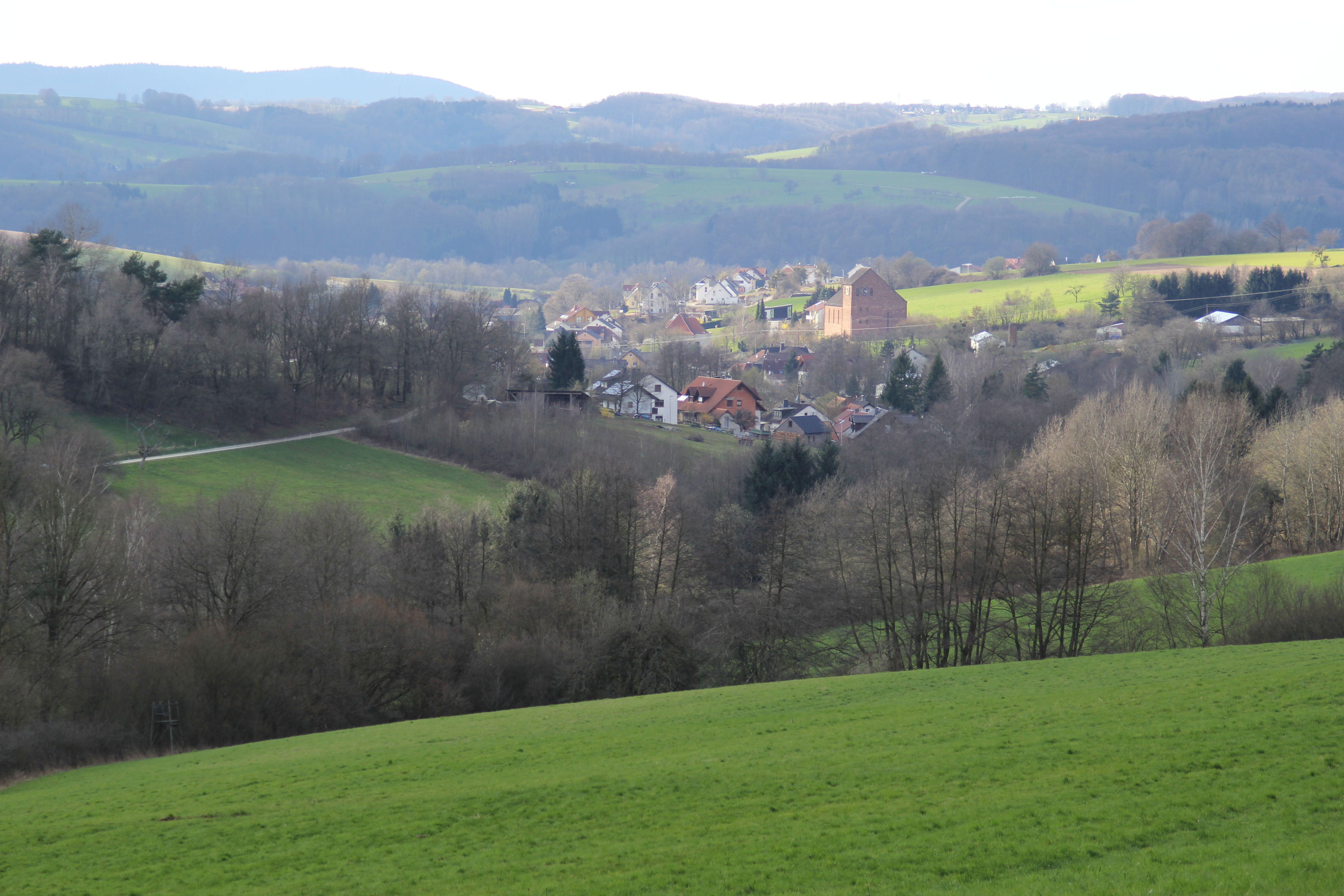 Sommerkahl im Landkreis Aschaffenburg, Bayern